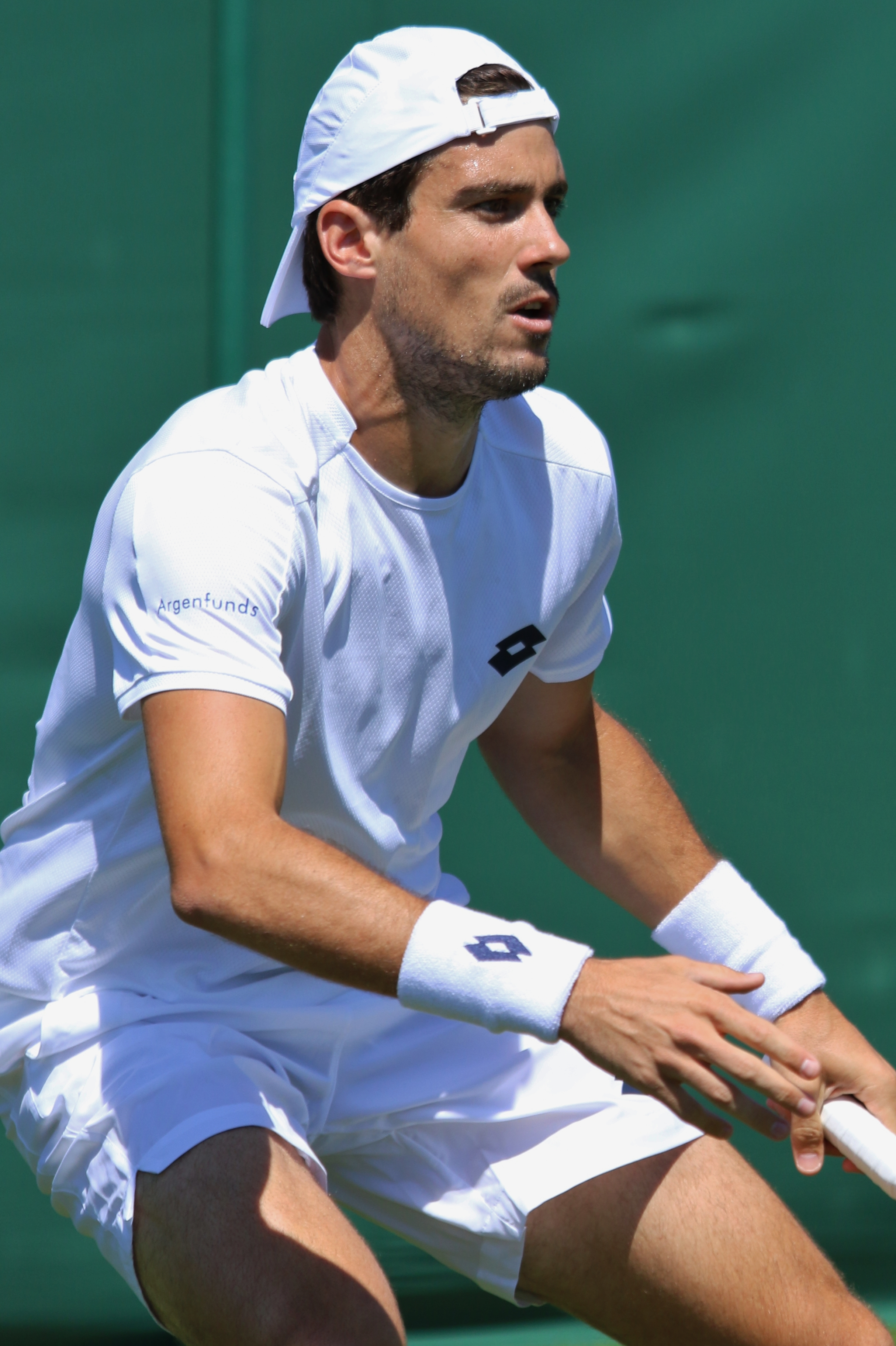 Pella WM18 (48)